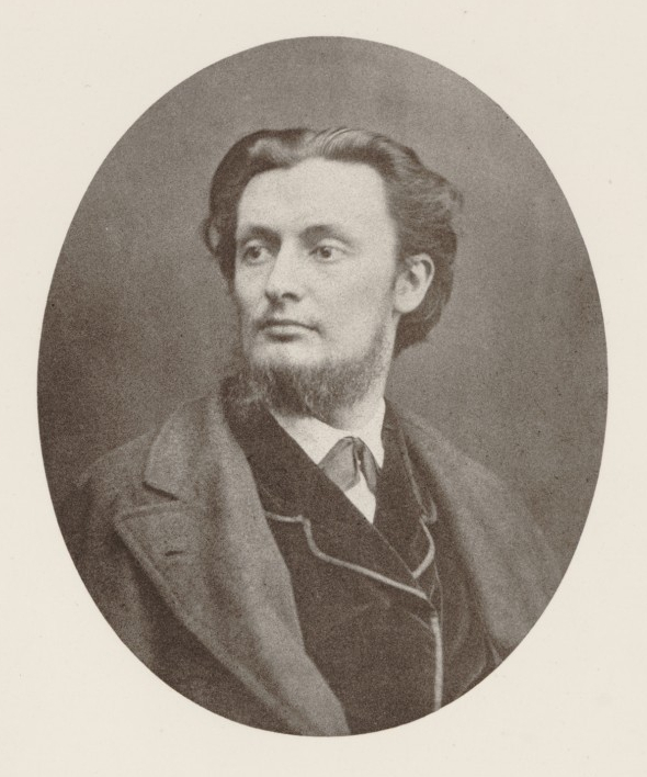 Armand Gouzien (1939-1892)